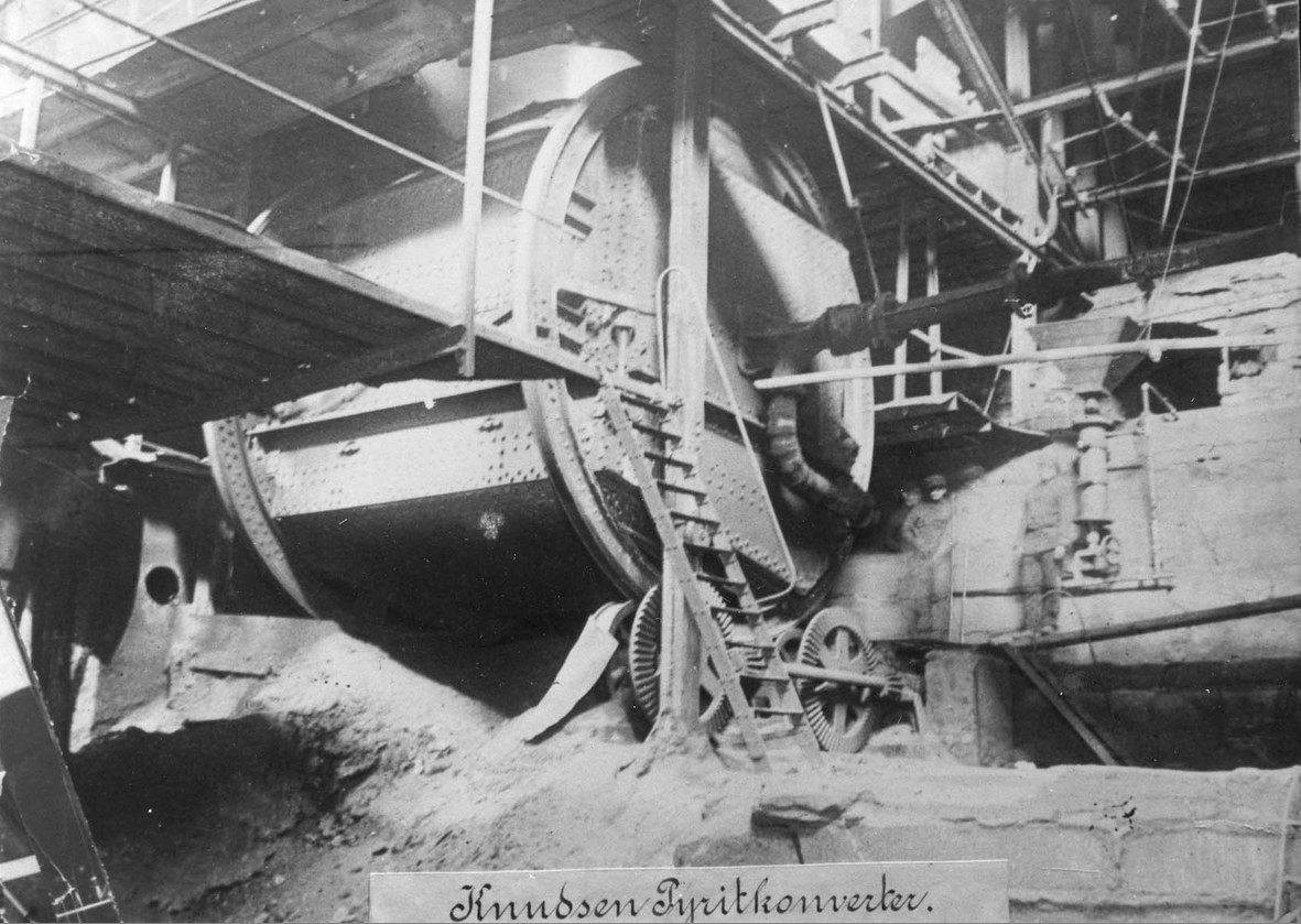 Direktør Knutsen var i Sulitjelma i tidsrommet 1897 -1907. Han fant opp en ny metode for smeltingen. Han utnytet svovelmalmen som brenstoff og kunne sløyfe røsteovnene. SG.F.10009-0768